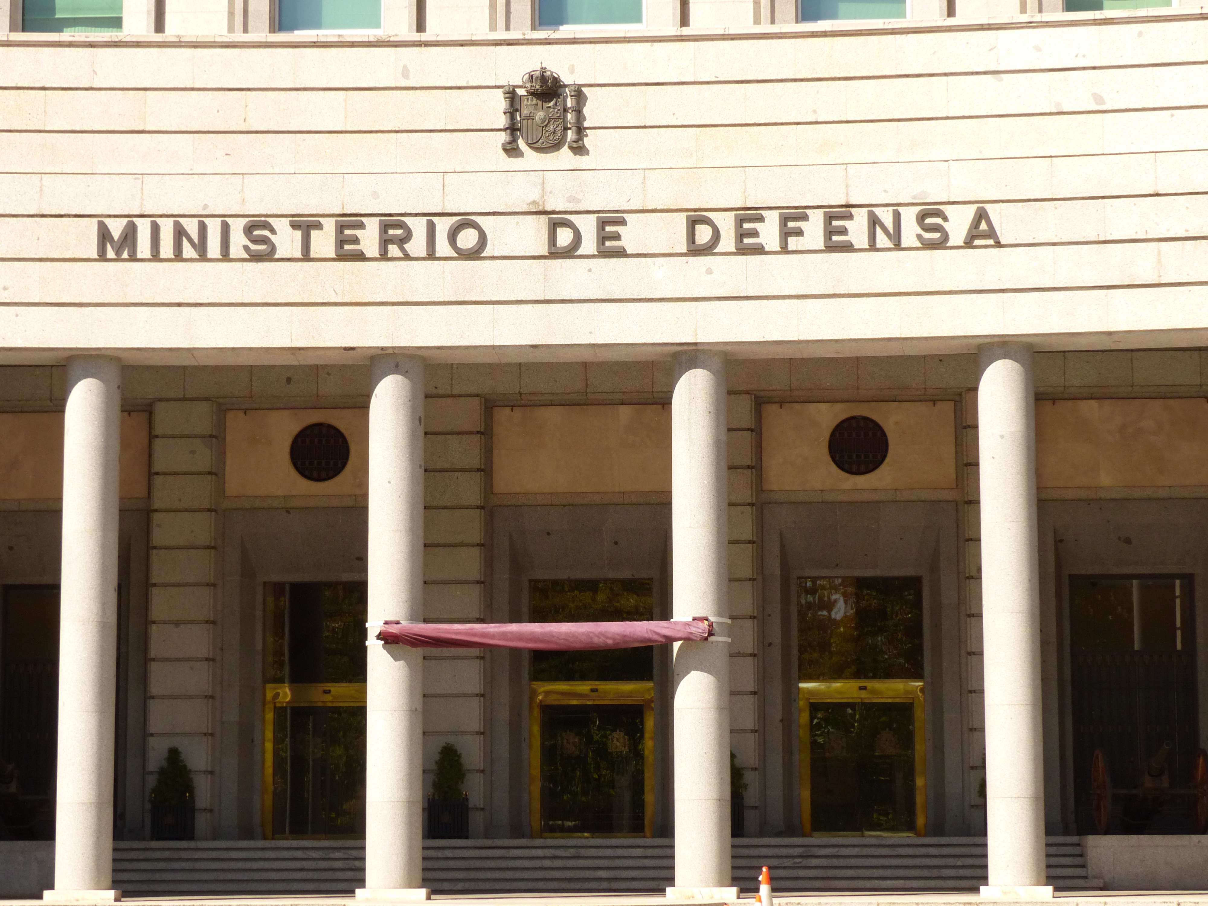 Ministerio de Defensa, entrada principal desde Castellana.